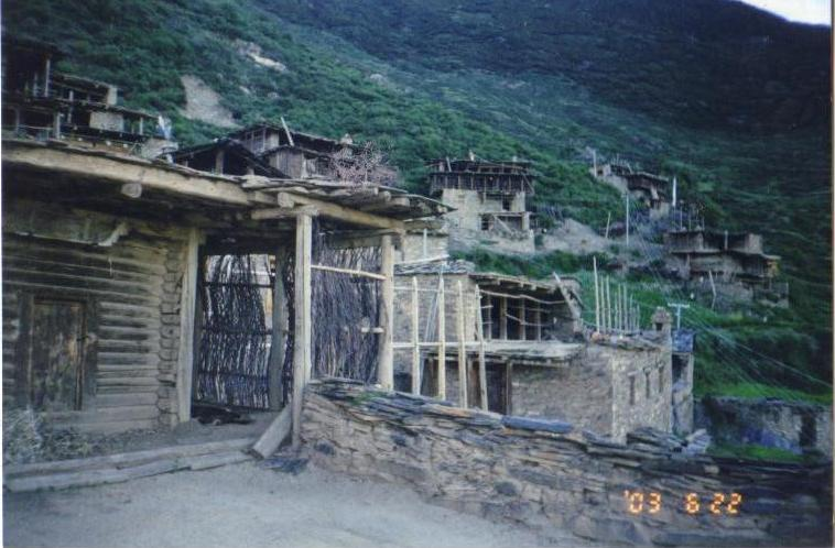 干木鸟村（马尔康县北部）